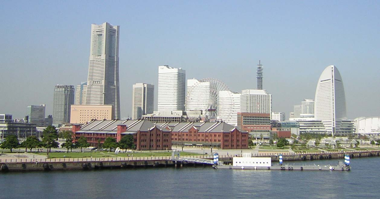 Yokohama, Minato Mirai 21